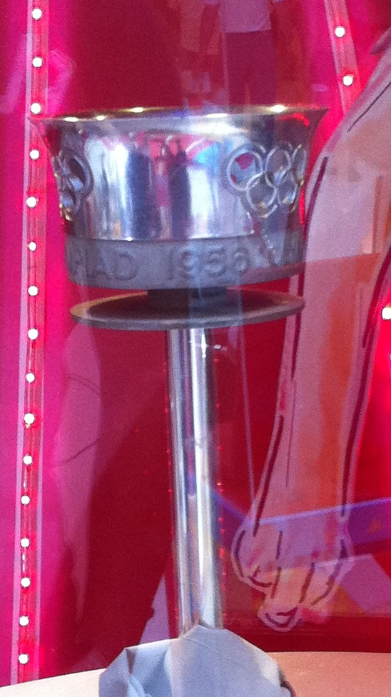 1956年夏季奧運火炬